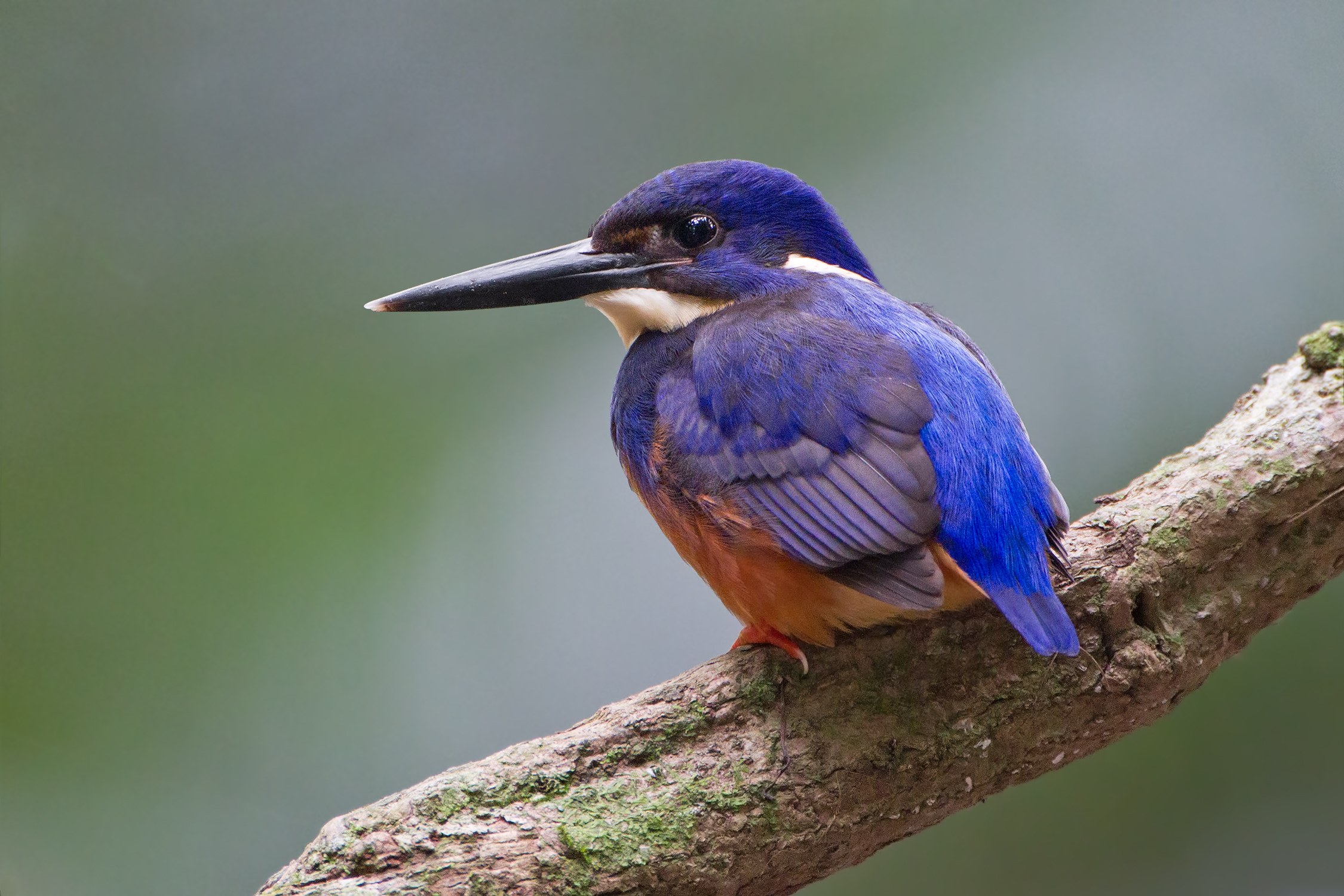 Azure Kingfisher Ceyx azureus azureus, Julatten, Queensland, Australia